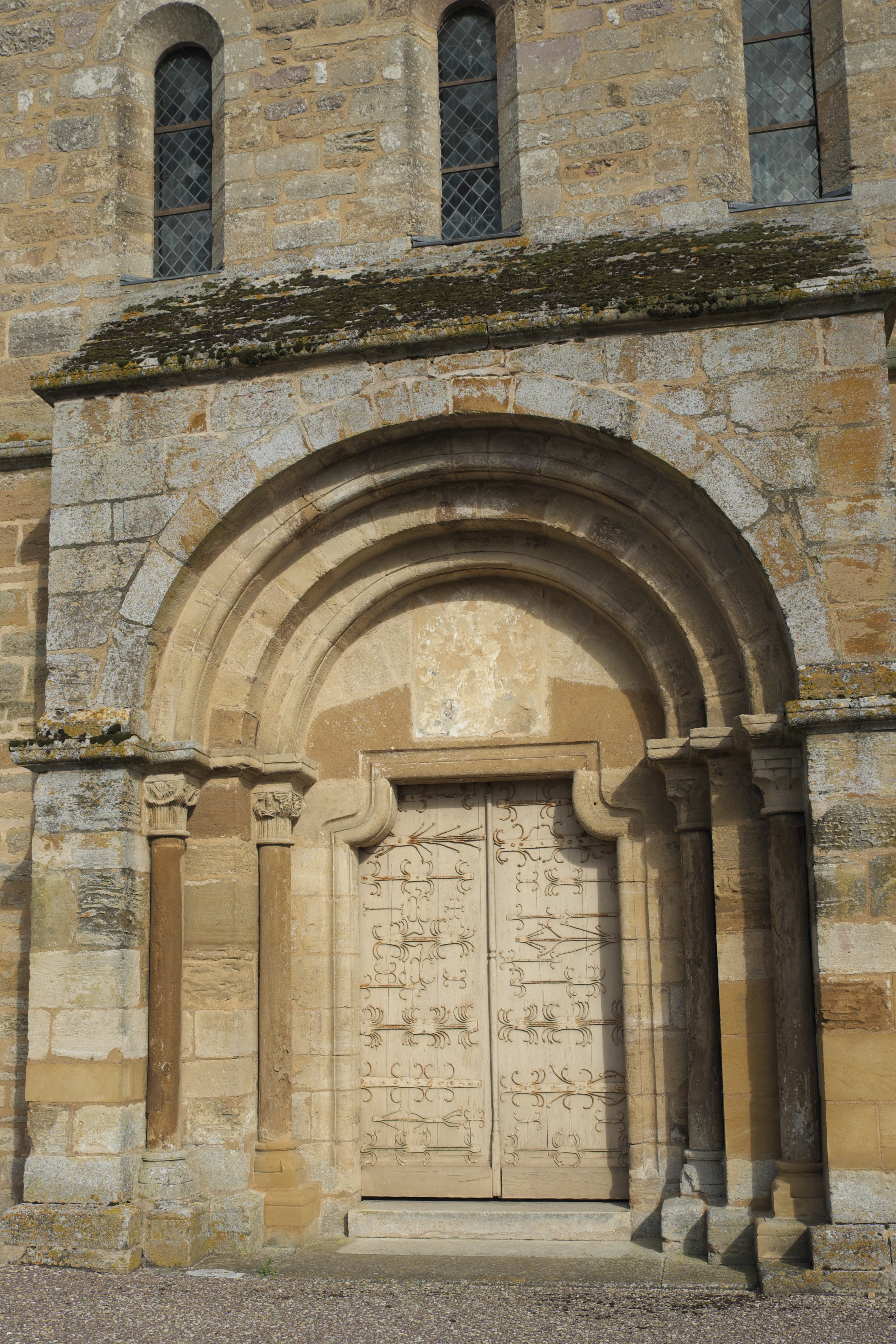 Katholische Kirche Notre-Dame-de-l'Assomption in Droyes im Département Haute-Marne (Champagne-Ardenne/Frankreich), romanisches Westportal .